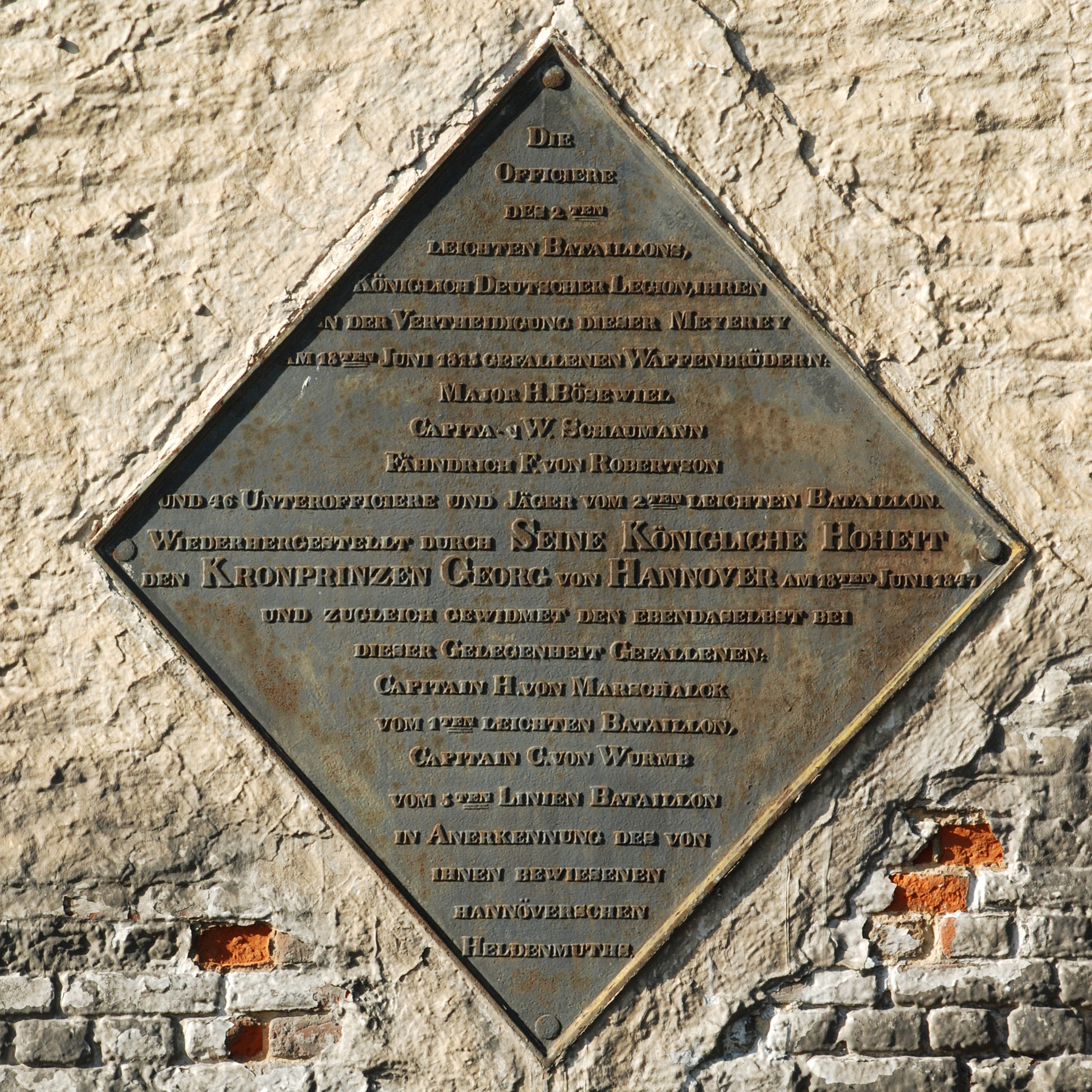 Belgique - Brabant wallon - Lasne - Plancenoit - Ferme de la Haie Sainte (bataille de Waterloo)